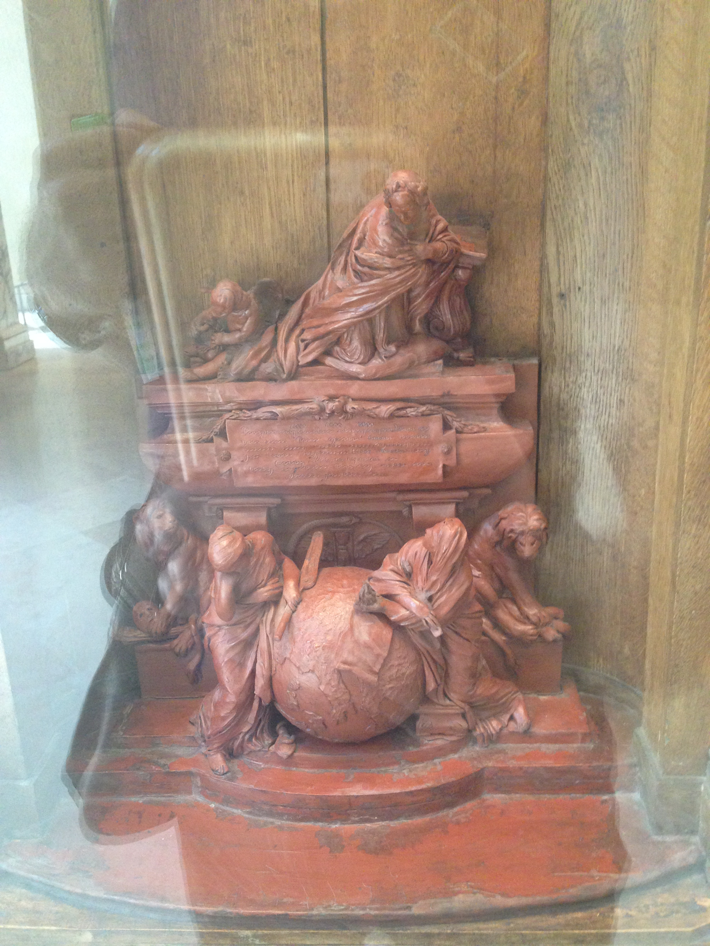 Edme Bouchardon, Maquette du Mausolée du cardinal de Fleury, Paris, musée du Louvre